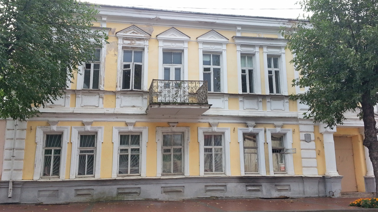 Беларуская (тарашкевіца): Будынак былой габрэйскай школы (хэдэр). г. Віцебск This is a photo of Belarusian heritage monument. Reference number: 213Г000032 ( WLM)